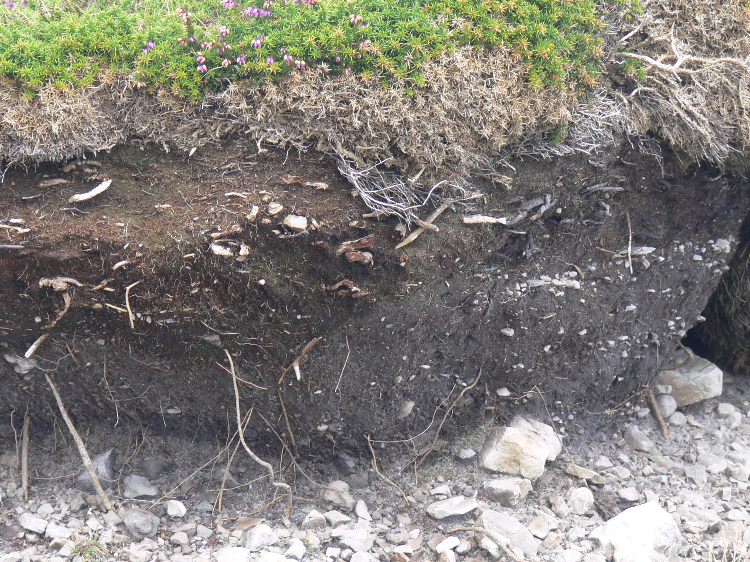 Couche de Terre de bruyère noire rendue visible par le creusement d'un sentier, suite au passage répété des gens, ayant fait apparaître le substrat superficiel de grès armoricain, sur le site du "Cap de la Chèvre" (ou "Beg Penn ar Roz" en Breton, sur la Presqu'île de Crozon, dans le Finistère, en Bretagne, dans l'Ouest de la France). Site classé pour son paysage, faisant partie du Parc naturel régional d'Armorique. Cette avancée rocheuse élevée (plus de 100 m) essentiellement constituée de "grès armoricain" datés du Paléozoïque anté-carbonifère (Schistes et Grès Primaires produits de - 570 à - 345 millions d'années) avec “Schistes pourprés” au sud, qui sont des formations détritiques rouges continentales, postorogéniques). Ce cap supporte une zone de lande rase poussant sur quelques cm à dizaines de cm de terre de bruyère, fortement exposée au vent, soleil (et embruns lors des tempêtes) - 2010/22/07.